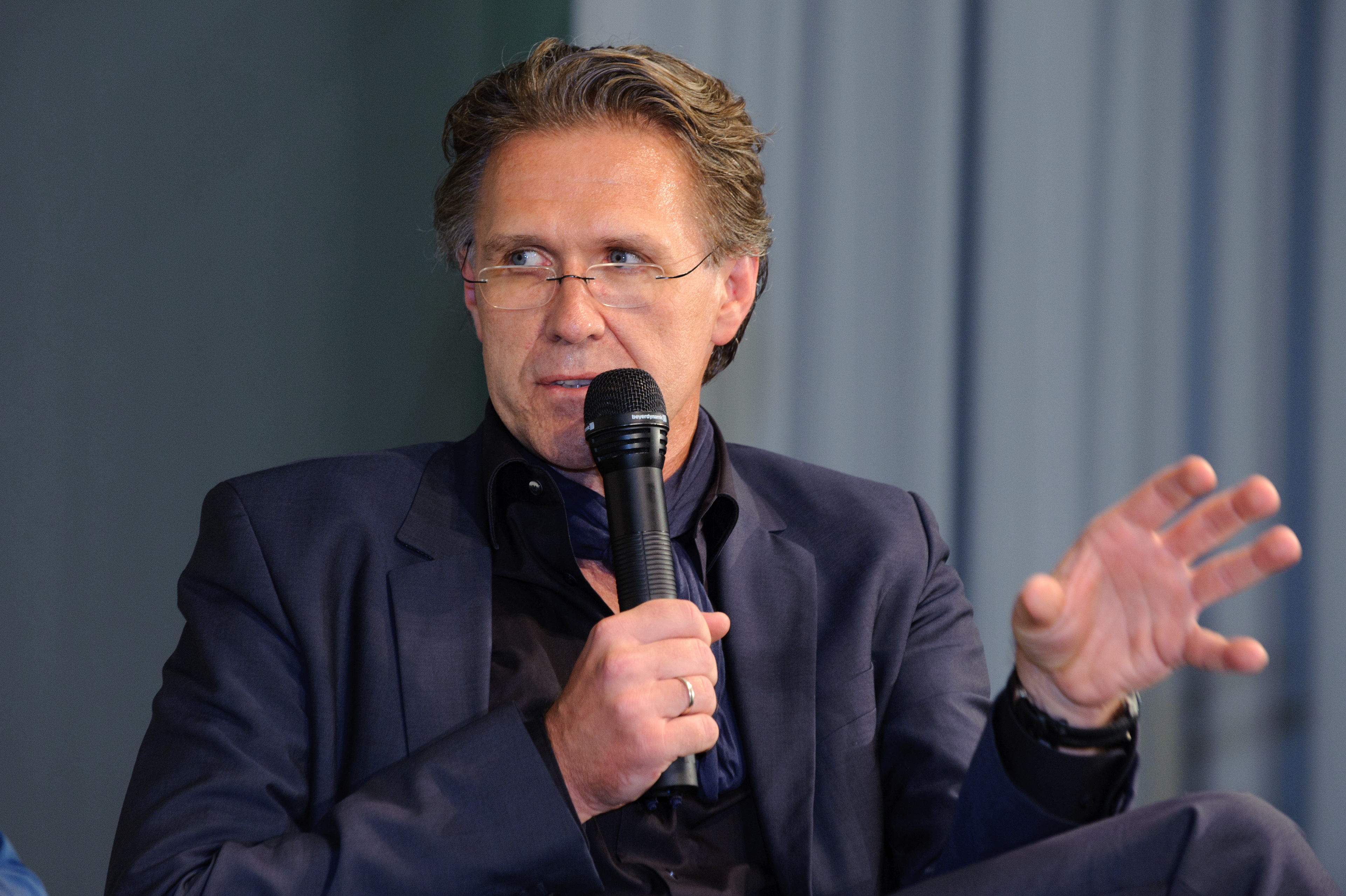 Foto: CC-BY-SA Stephan Röhl Die Bilder enstanden bei der Veranstaltung: "Ü30! Die Grünen vor neuen Herausforderungen" 30 Jahre Grüne. Die einst kleine Ökopartei ist zu einer festen Größe in der politischen Landschaft geworden. Ökologie, nachhaltiges Wirtschaften, Umweltschutz, erneuerbare Energien und Gleichstellung sind im gesellschaftlichen Mainstream angekommen. Sie werden deshalb auch von anderen Parteien aufgegriffen. Selbst sind die Grünen im Stimmungshoch, nicht nur in der Hauptstadt. Wie können sie dieses inhaltlich und programmatisch ausfüllen? Die Heinrich-Böll-Stiftung bringt führende Grüne mit herausragenden Gästen aus Kultur, Wissenschaft, Unternehmen und Gewerkschaften zusammen, um der Partei einen Spiegel vorzuhalten und gemeinsam darüber zu reden, welches die großen grünen Themen der nächsten zehn Jahre sind.